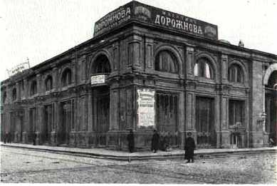 Общий вид пассажа Тагиева. Гражд. инж. К. Б. Скуревич. 1896-1898 гг. Фото 1900-х гг.